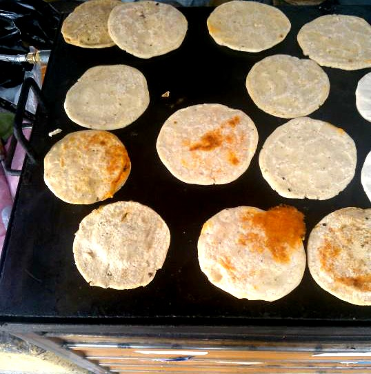 Gorditas, platillo típico del municipio de Charcas en el estado de San Luis Potosí, México.